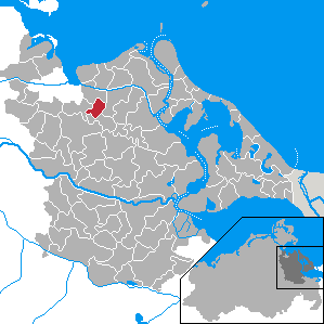 Hanshagen, Landkreis Ostvorpommern, Mecklenburg-Vorpommern